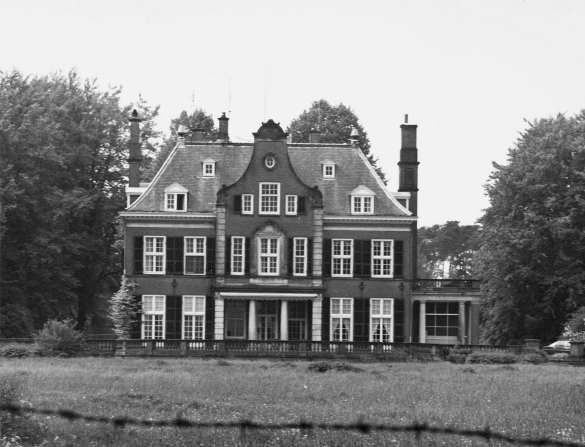 Hooge Boekel: Overzicht van de voorgevel (opmerking: Afdrukken verkregen via Ypie Attema, oud medewerkster van de Rijksdienst voor de Monumentenzorg.)